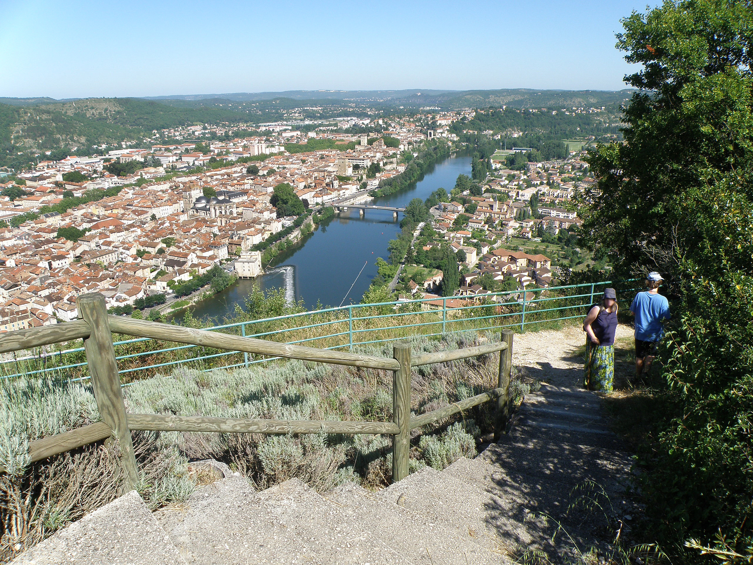 Cahors (Lot, France). Vue prise du mont Saint-Cyr, au sud et sud-est de la ville.